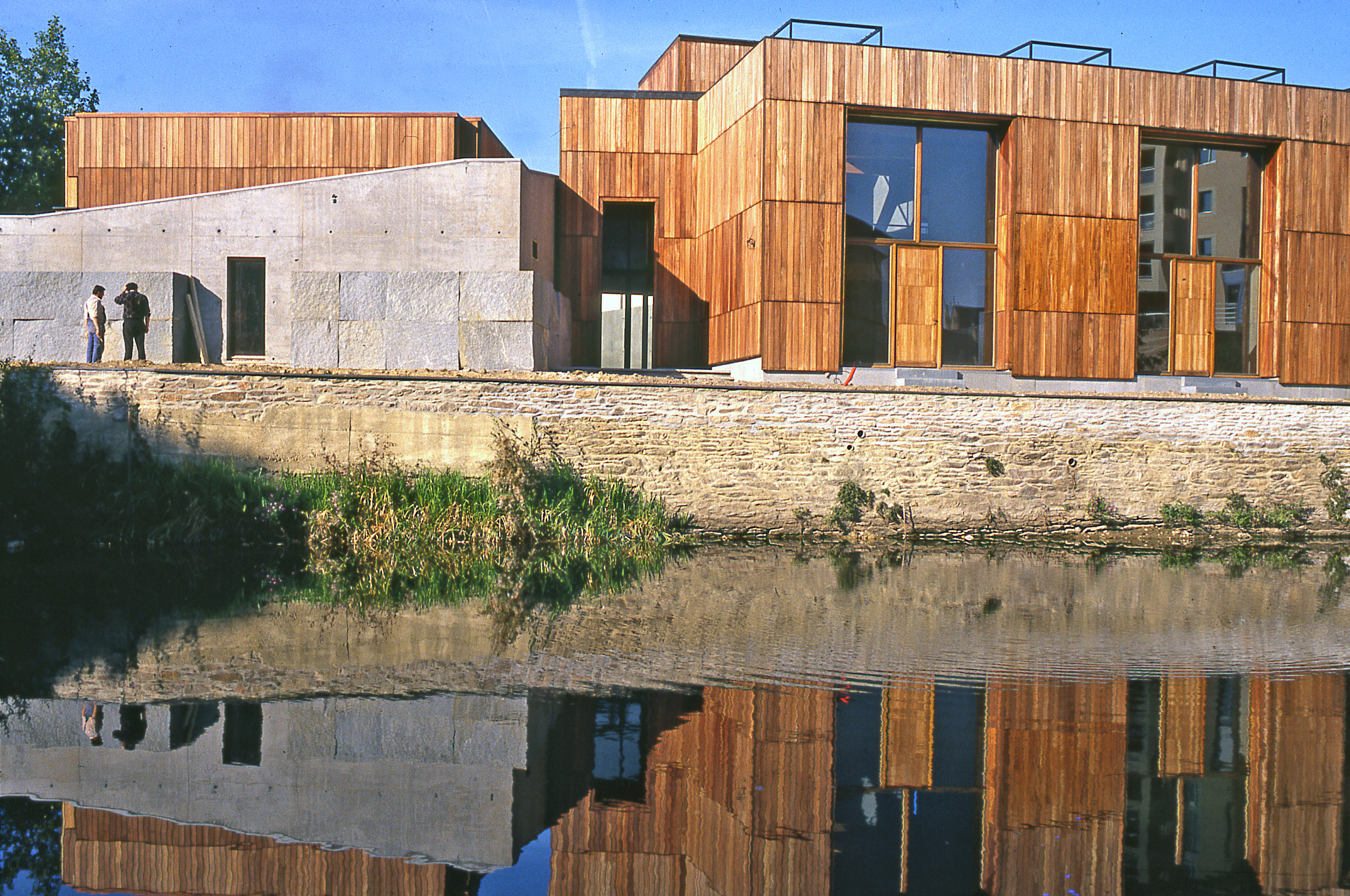 ENSAB Façade nord